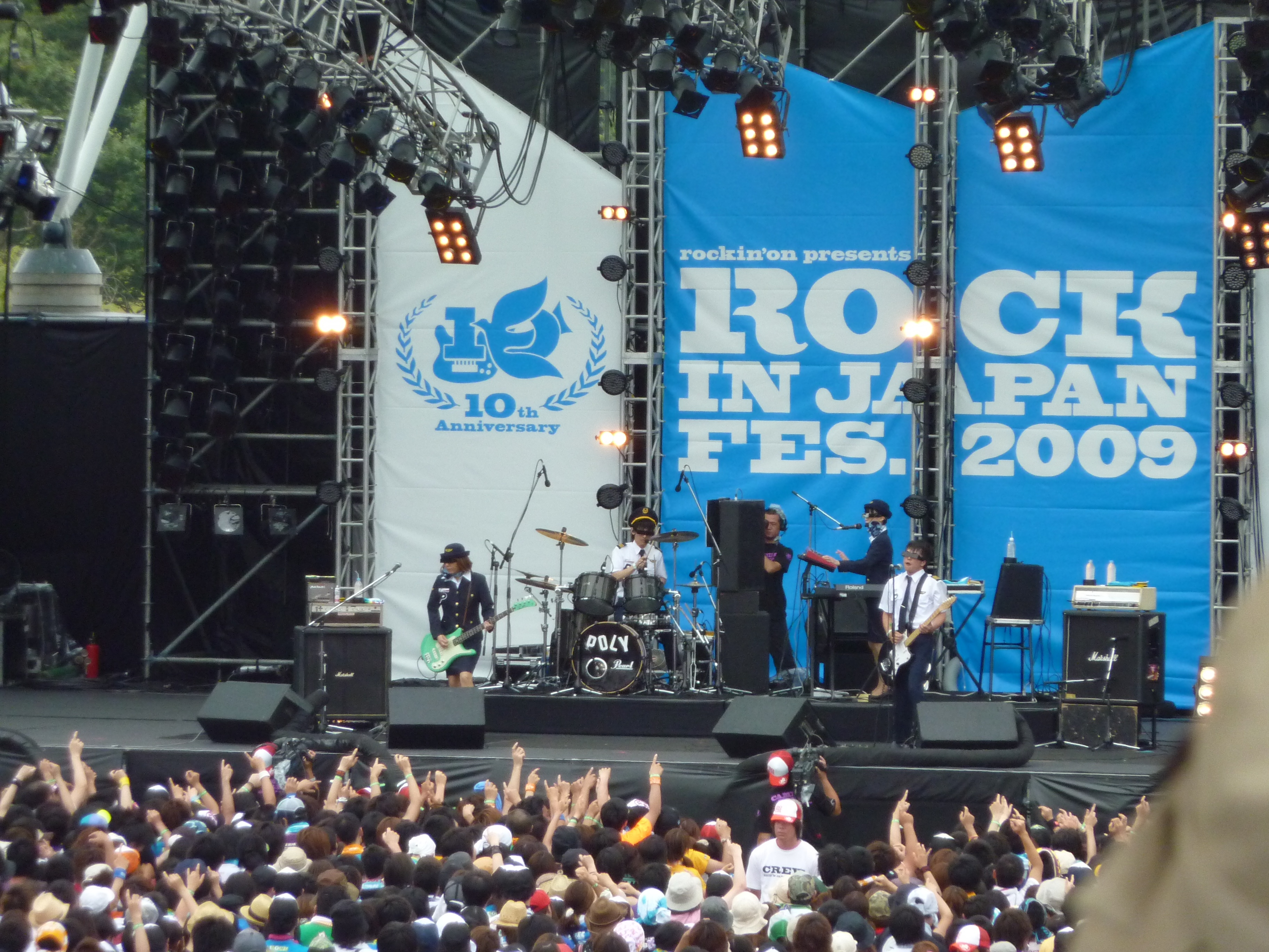 POLYSICS